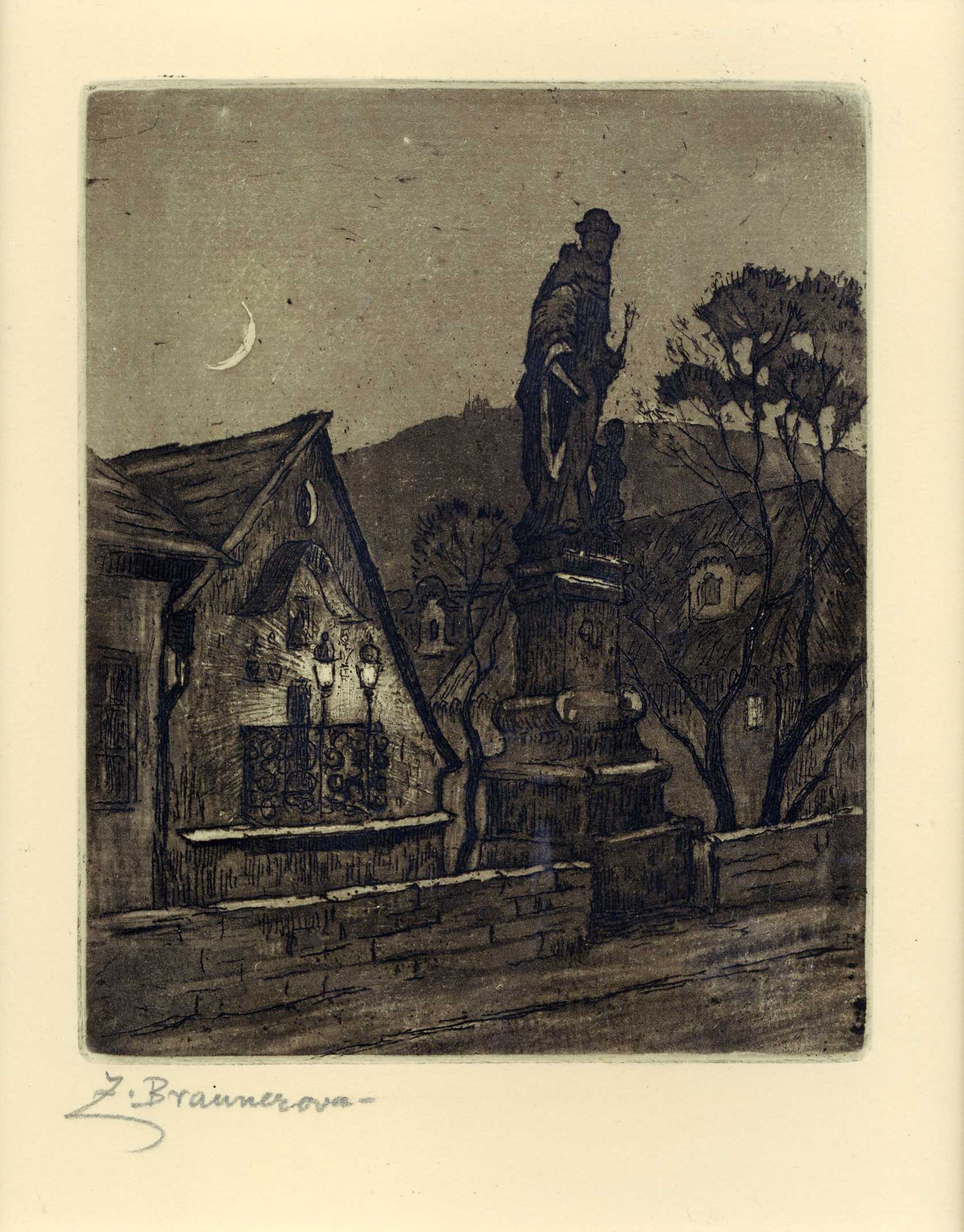 Akvatinta